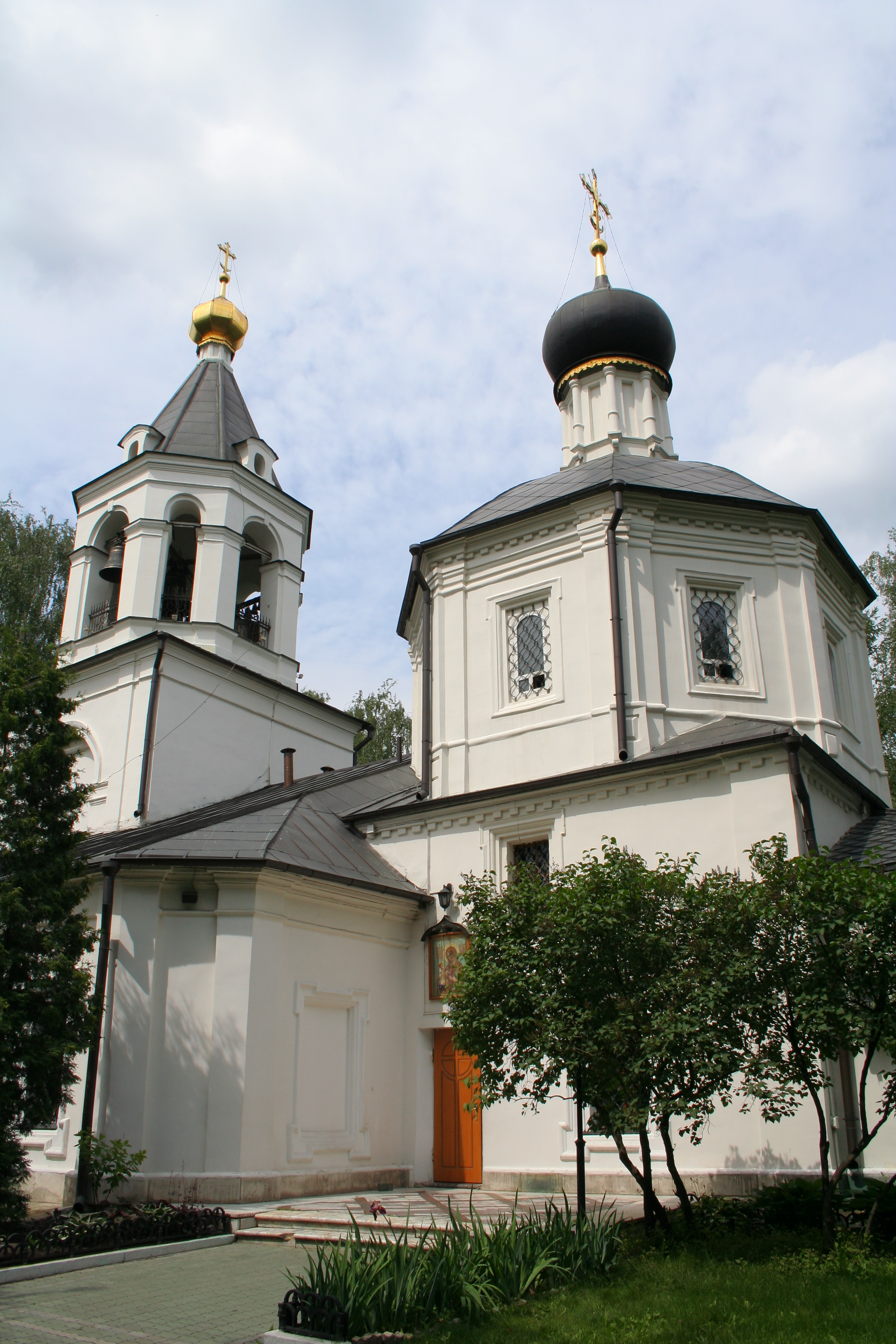 Kirche der Gewandniederlegung Mariä zu Leonowo, Moskau.